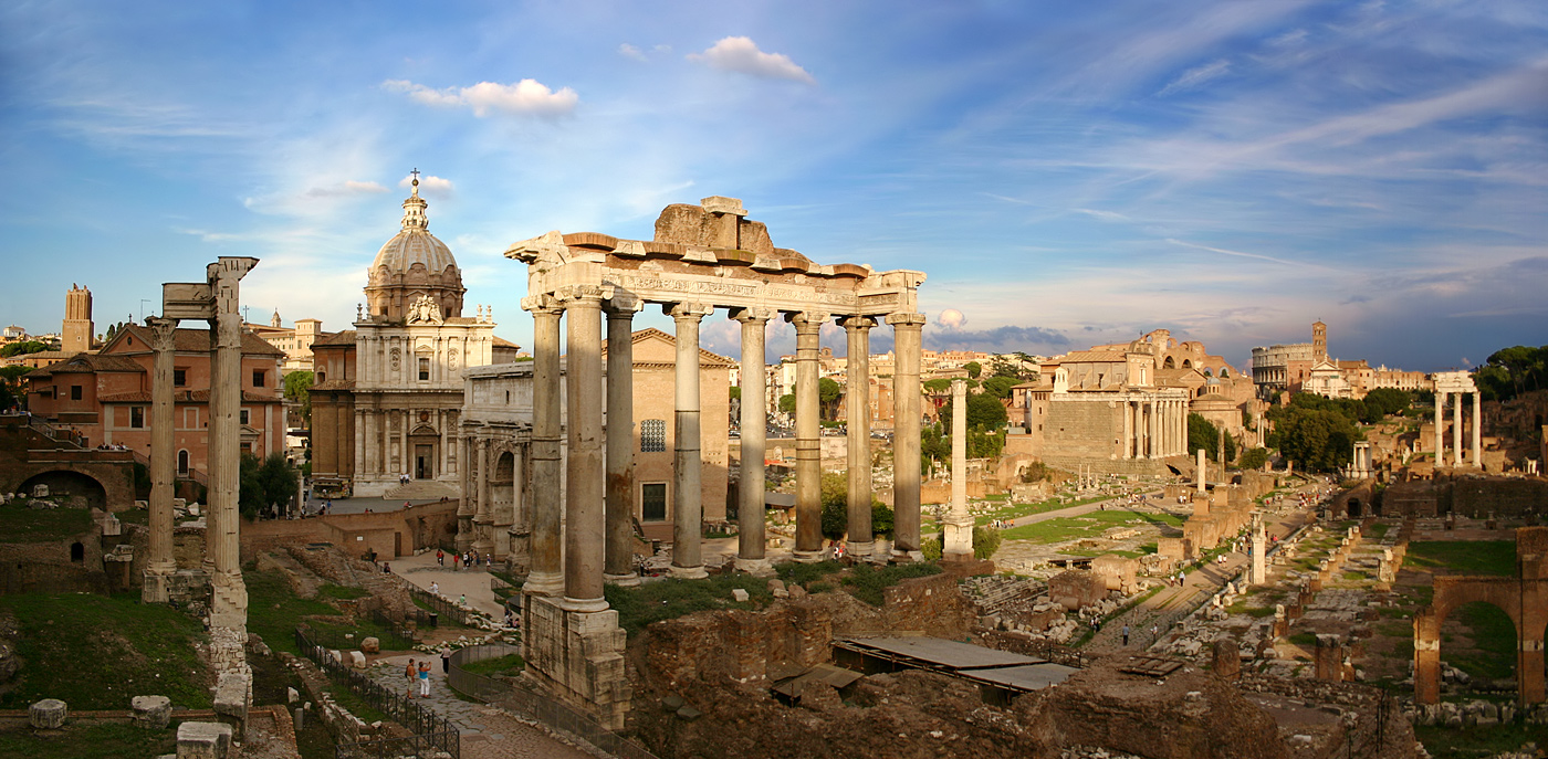 Blick über das Forum Romanum, Rom